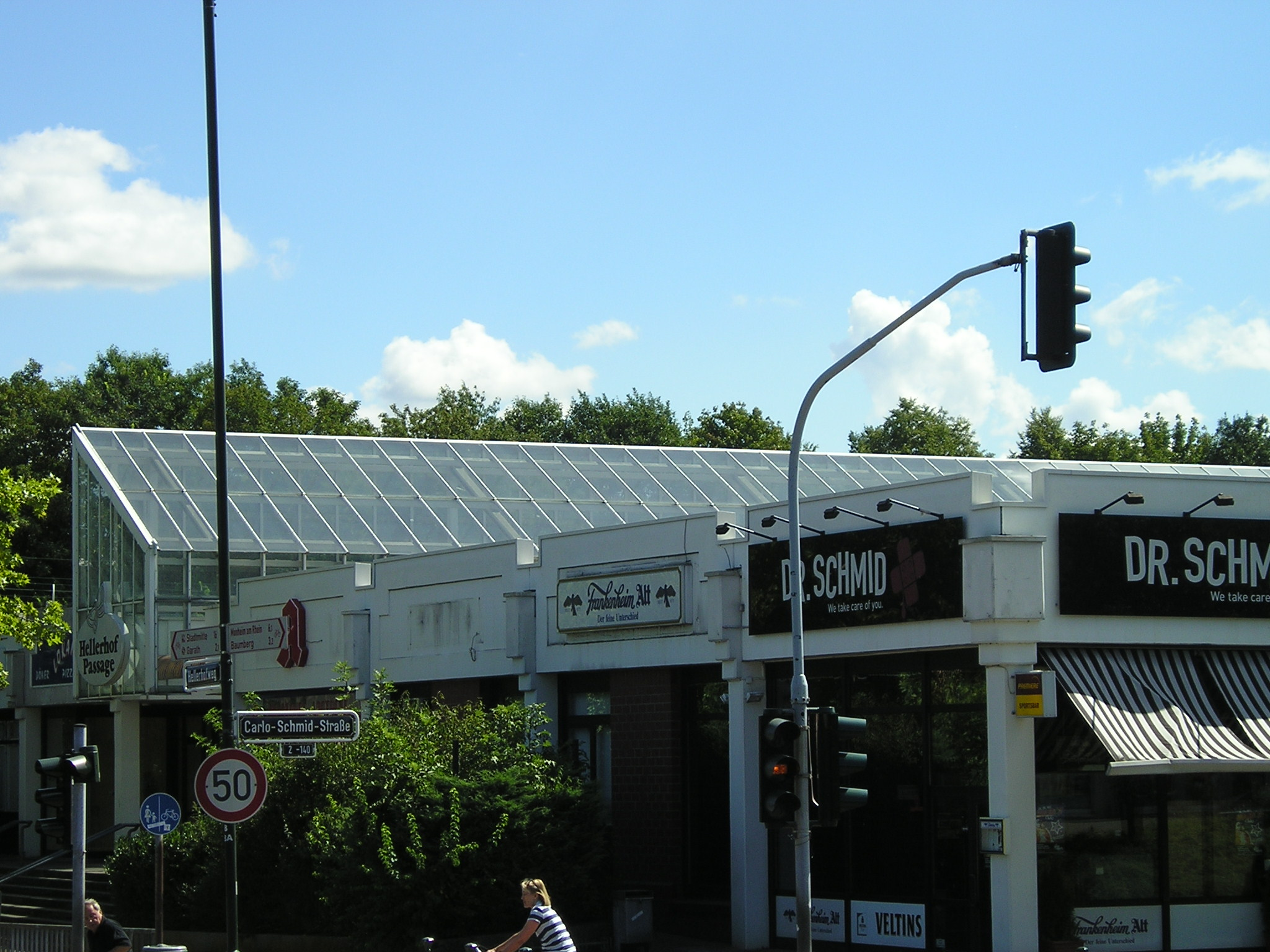 Einkaufszentrum in Düsseldorf-Hellerhof (Hellerhof Passage)